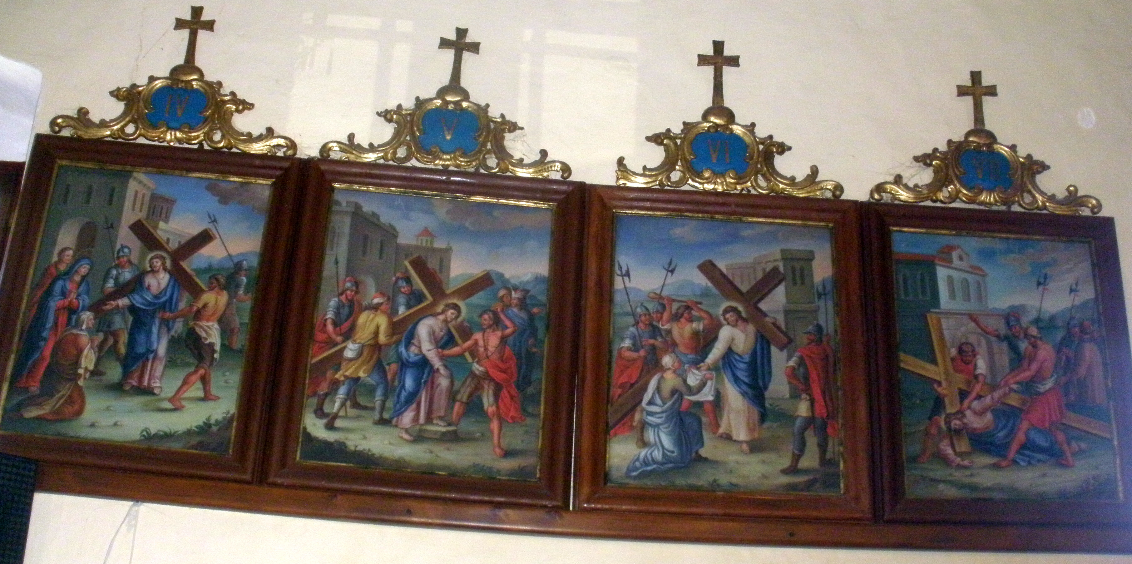 Via crucis from Karel Goetzl (1816-1892)